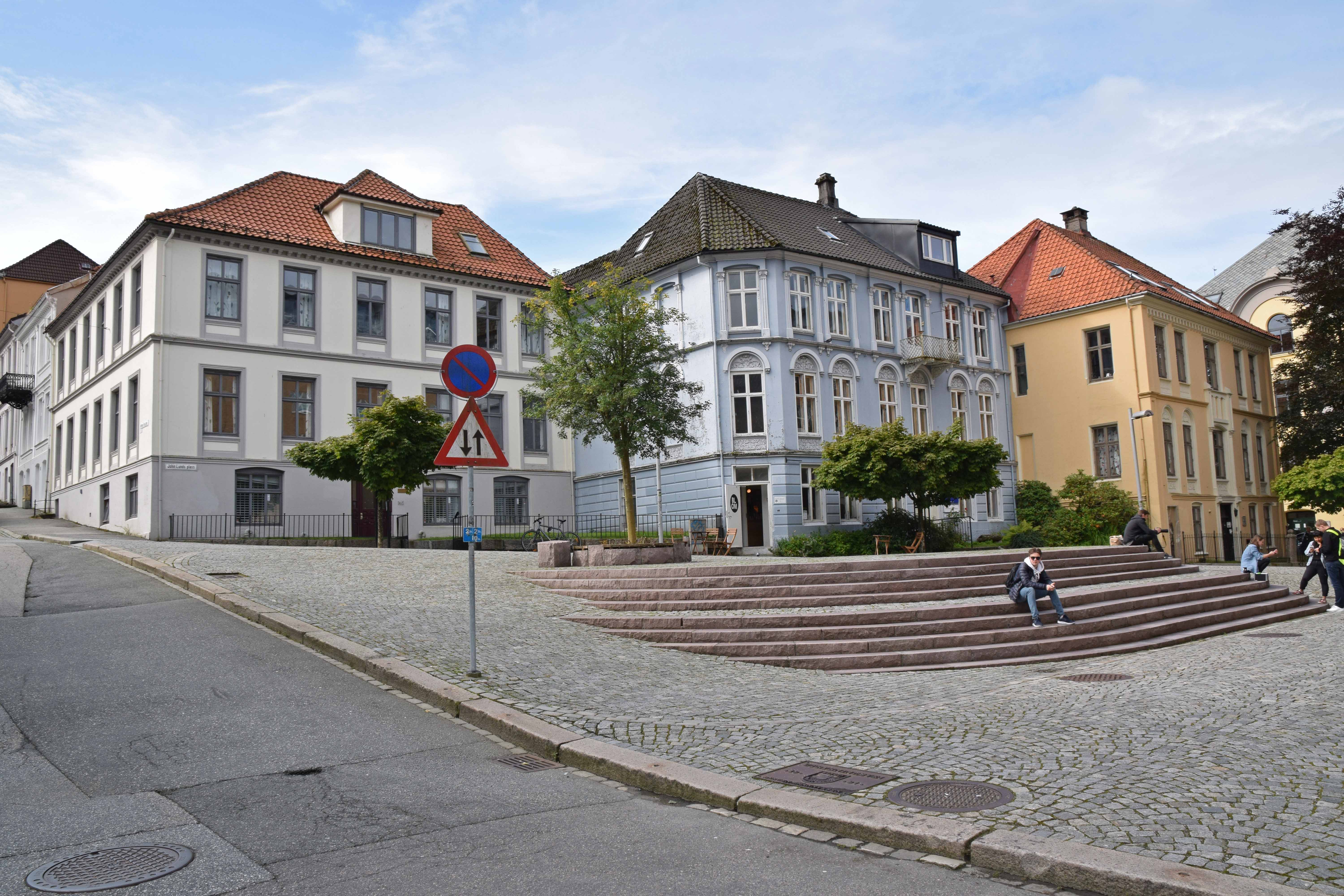 John Lunds plass, på Nygårdshøyden i Bergen sentrum